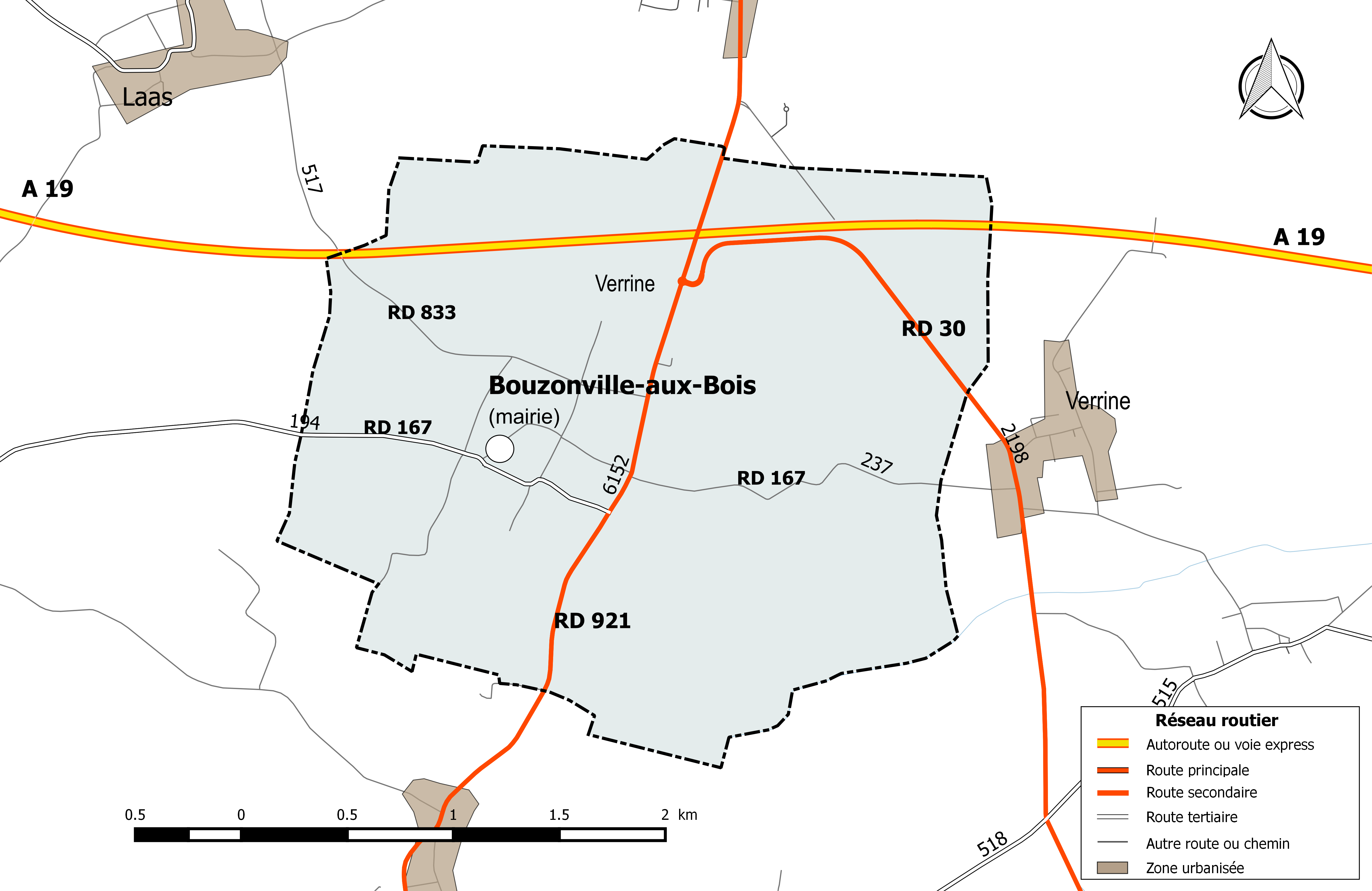 Carte du réseau routier de la commune de Bouzonville-aux-Bois.